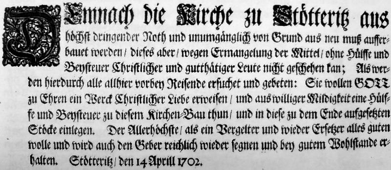 Einblattdruck zum Bau der (später so genannten) Marienkirche in Leipzig-Stötteritz